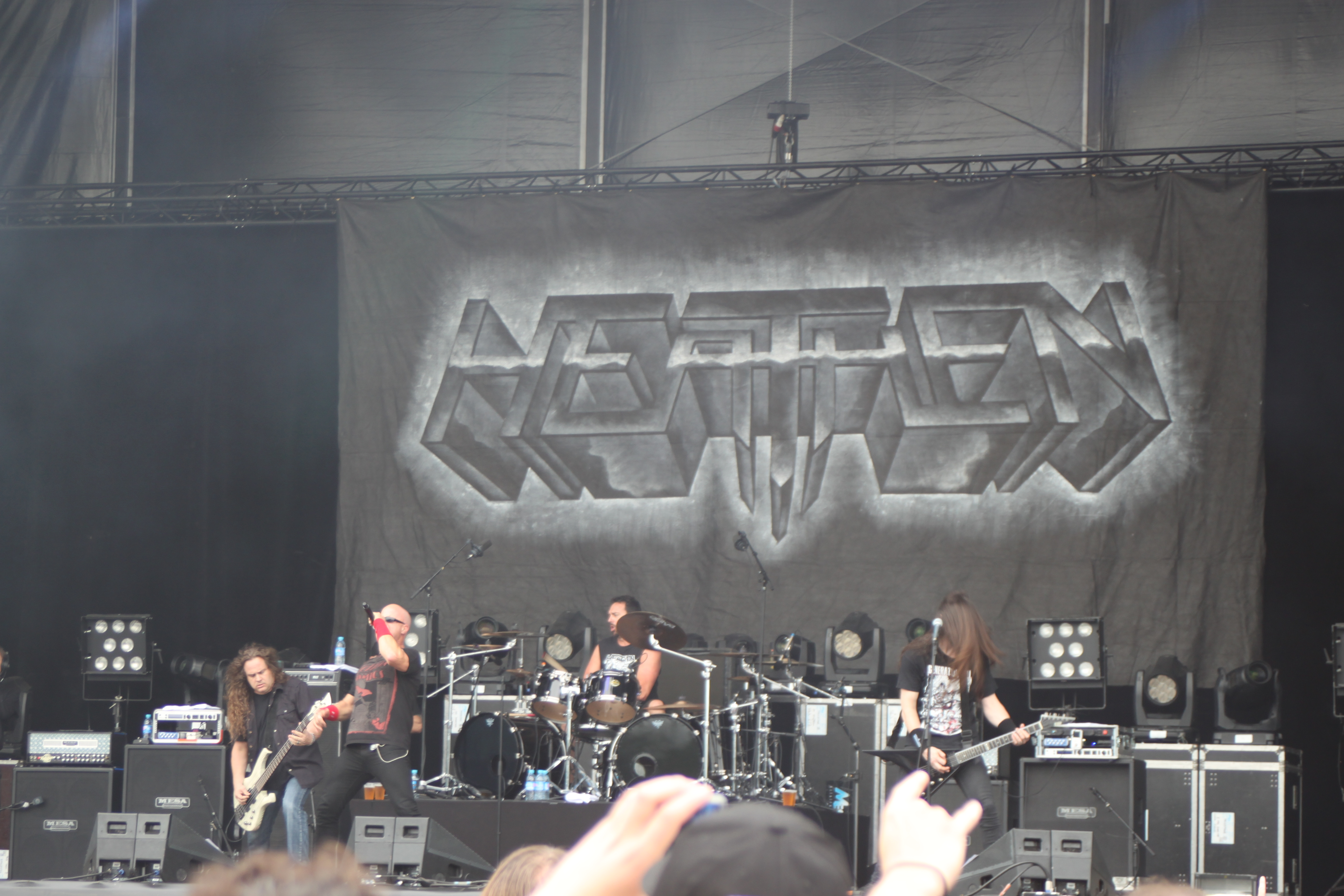 Heathen, Helfest 2013, Fr-44-Clisson.